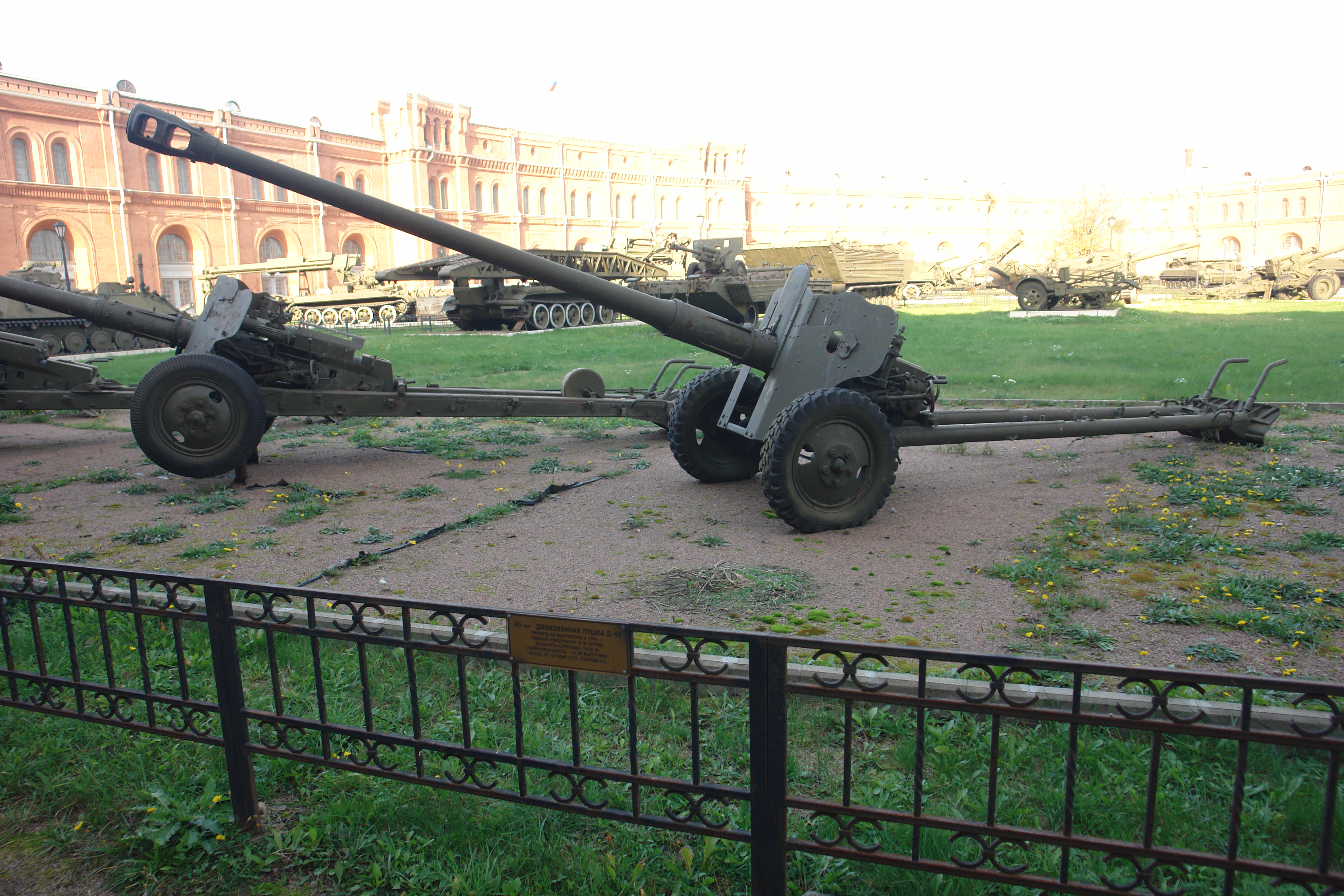 85-мм ДИВИЗИОННАЯ ПУШКА Д-44 ПРИНЯТА НА ВООРУЖЕНИЕ В 1946 г. ГЛАВНЫЙ КОНСТРУ^ОР Ф.Ф.ПЕТРОВ. ДАЛЬНОСТЬ СТРЕЛЬБЫ-15650 м. СКОРОСТРЕЛЬНОСТЬ - 15-20 ВЫСТР/МИН. МАССА, КГ: ОРУДИЯ-1725 СНАРЯДА-9,5. Военно-исторический музей артиллерии, инженерных войск и войск связи, Санкт-Петербург.